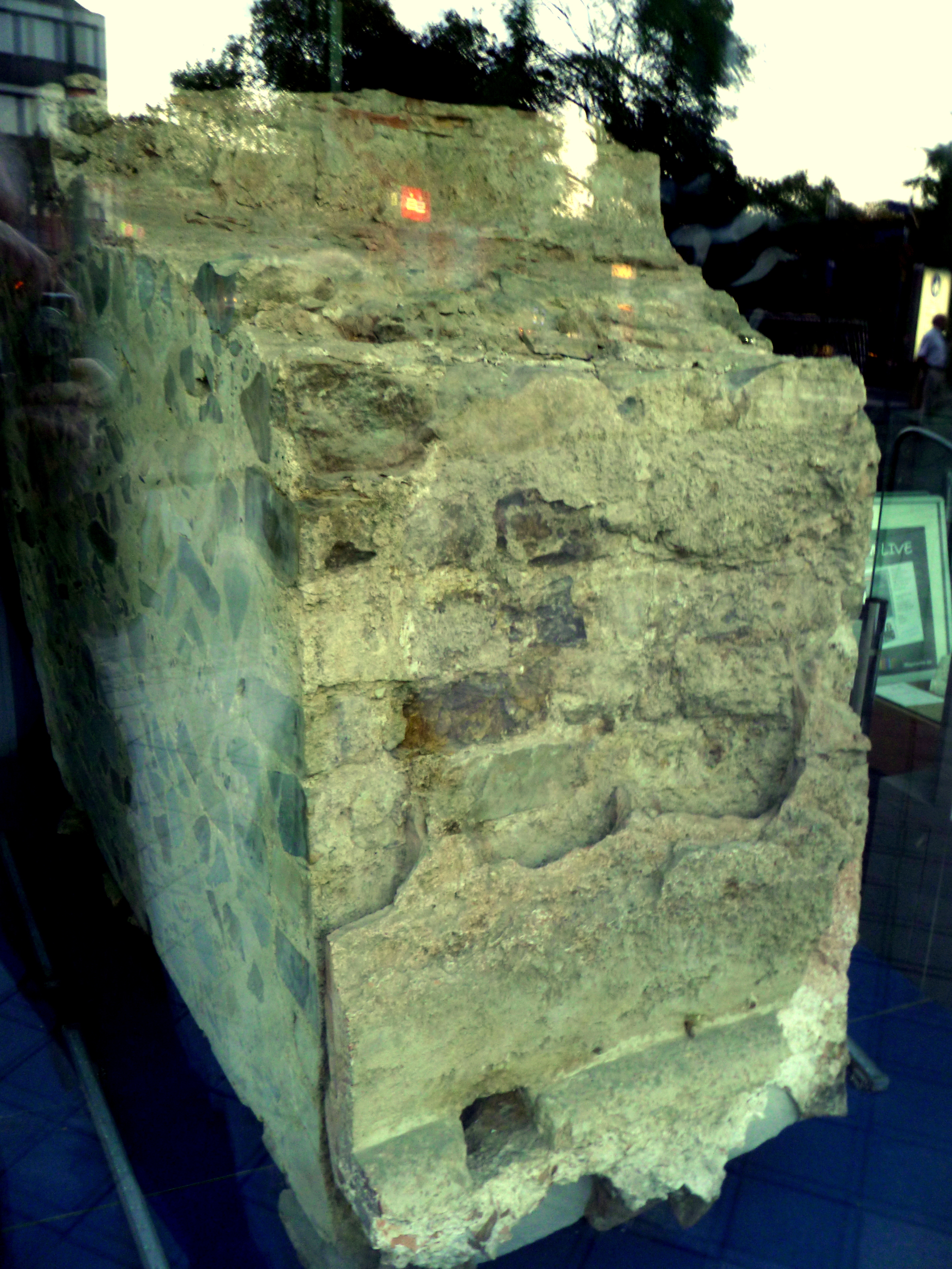 Teile einer römischen Apsis von der Bücheltherme (hinter Glas)